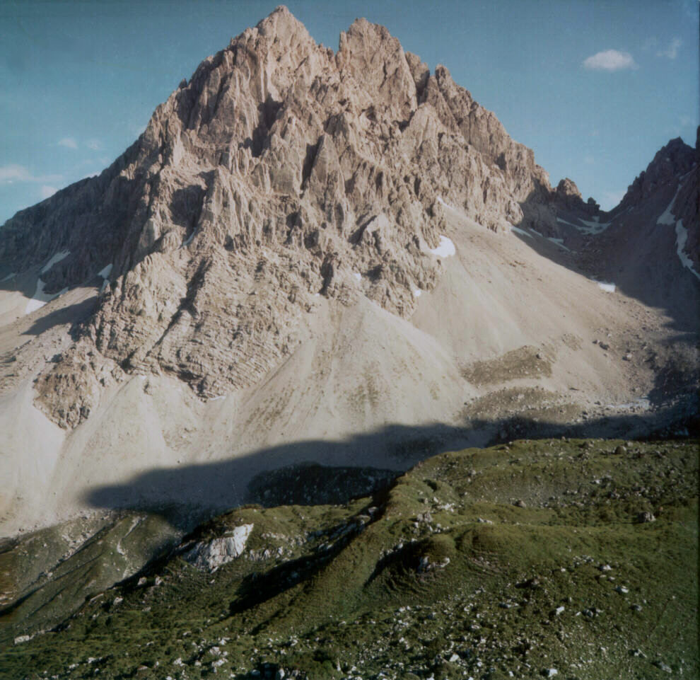 Dremelspitze von Norden, Lechtaler Alpen, Österreich